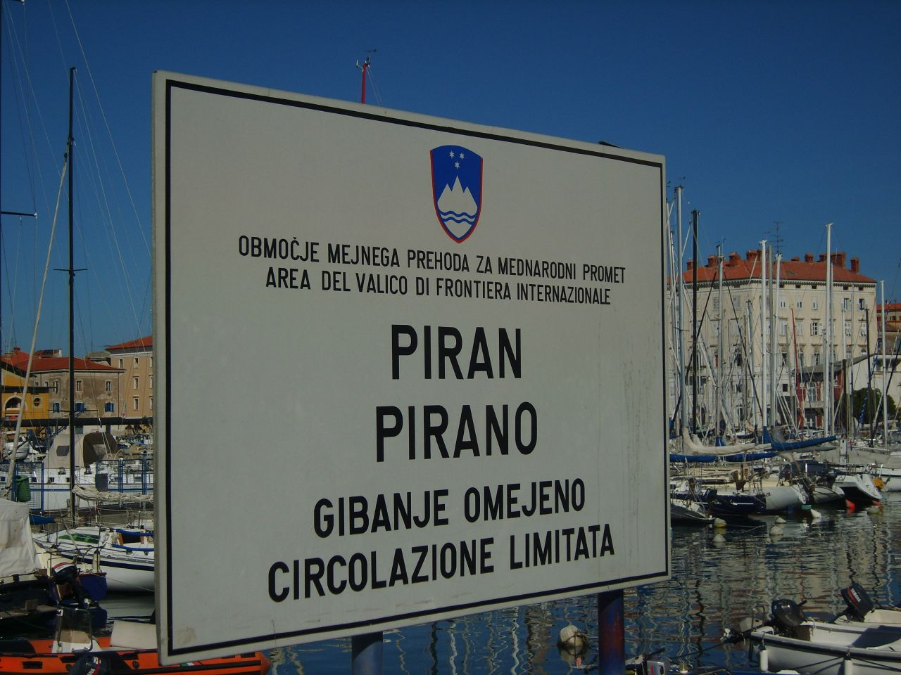 Piran - bilingual signs!